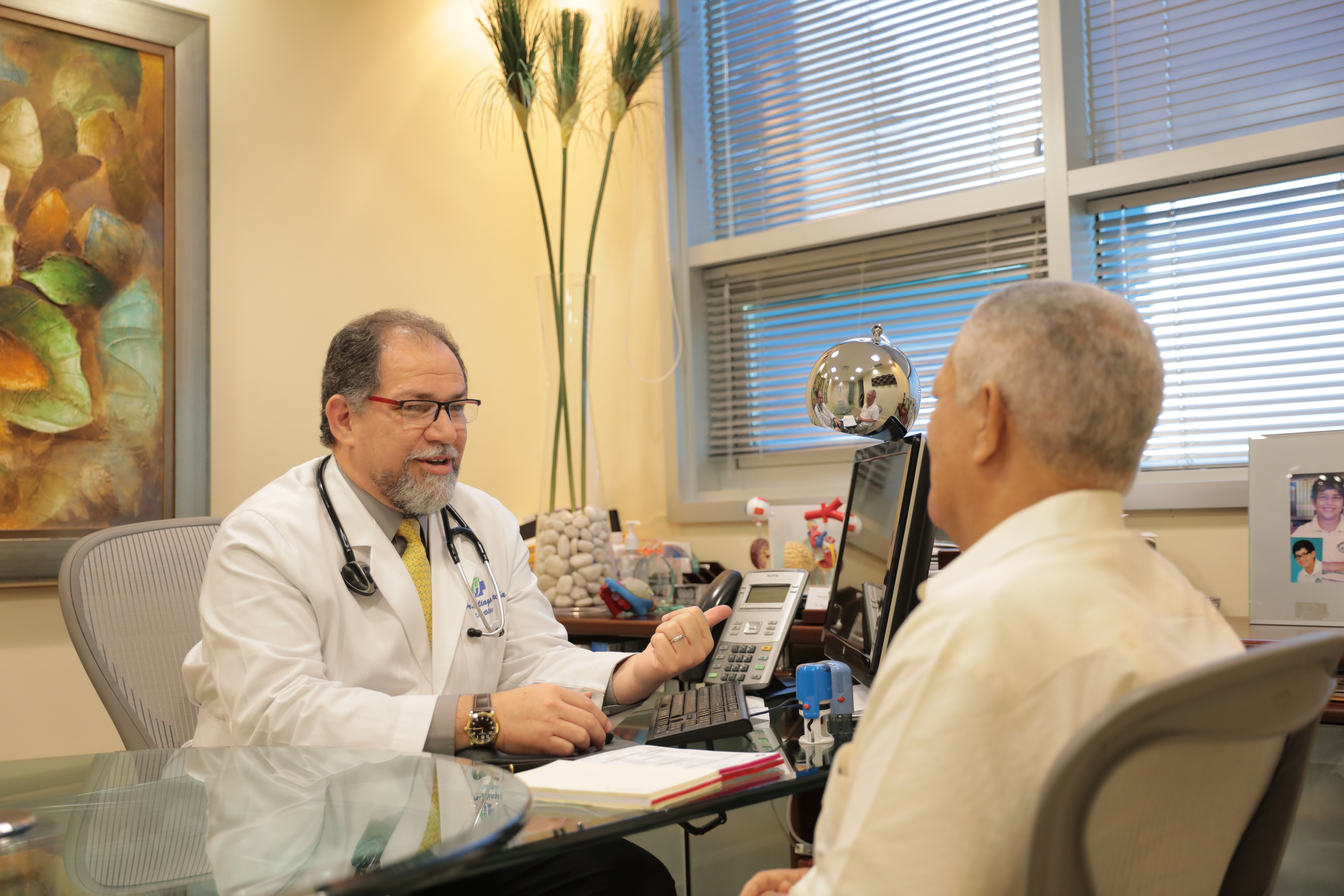 Consultas en distintas especialidades médicas.